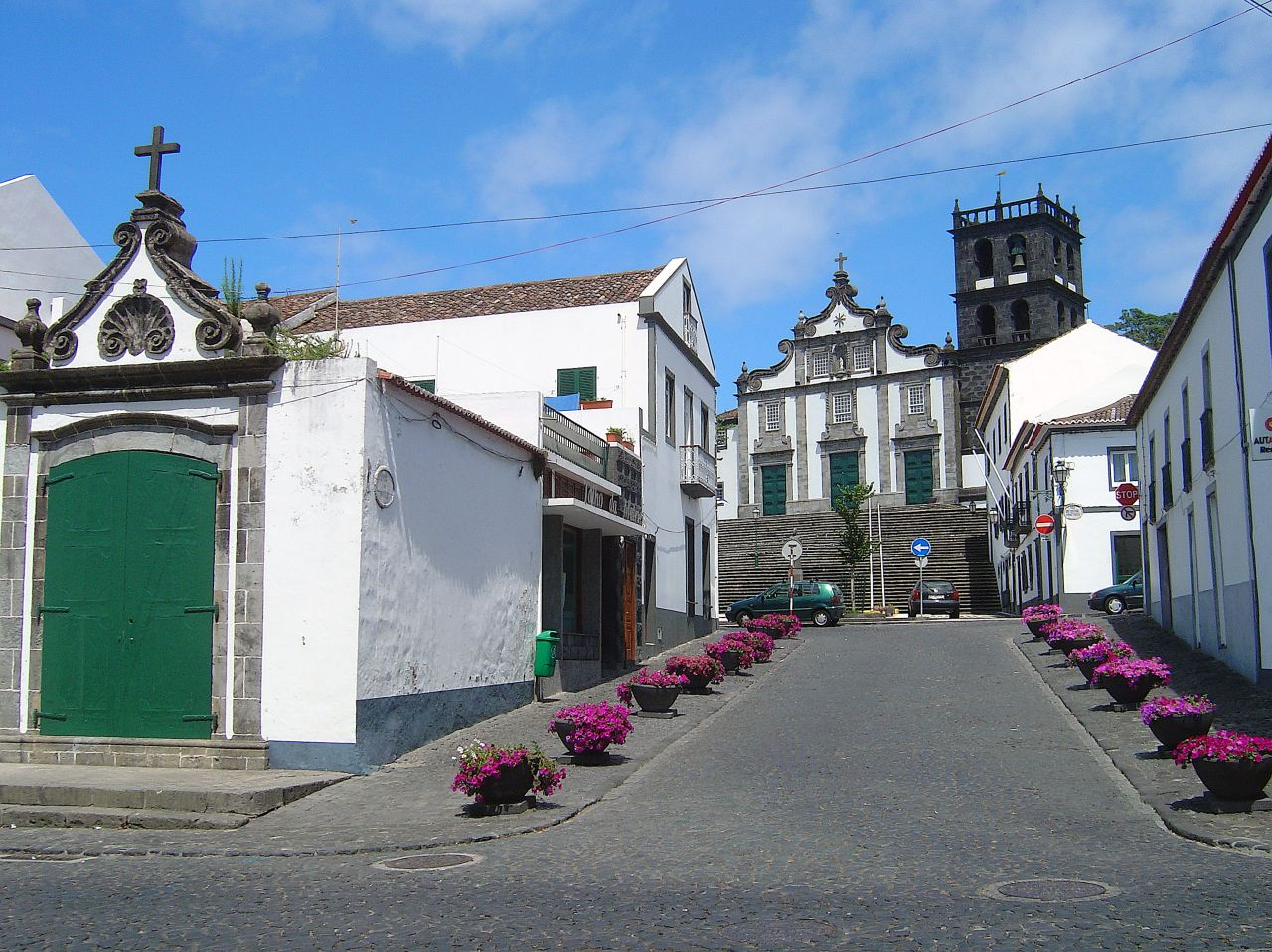 Ilha de S. Miguel